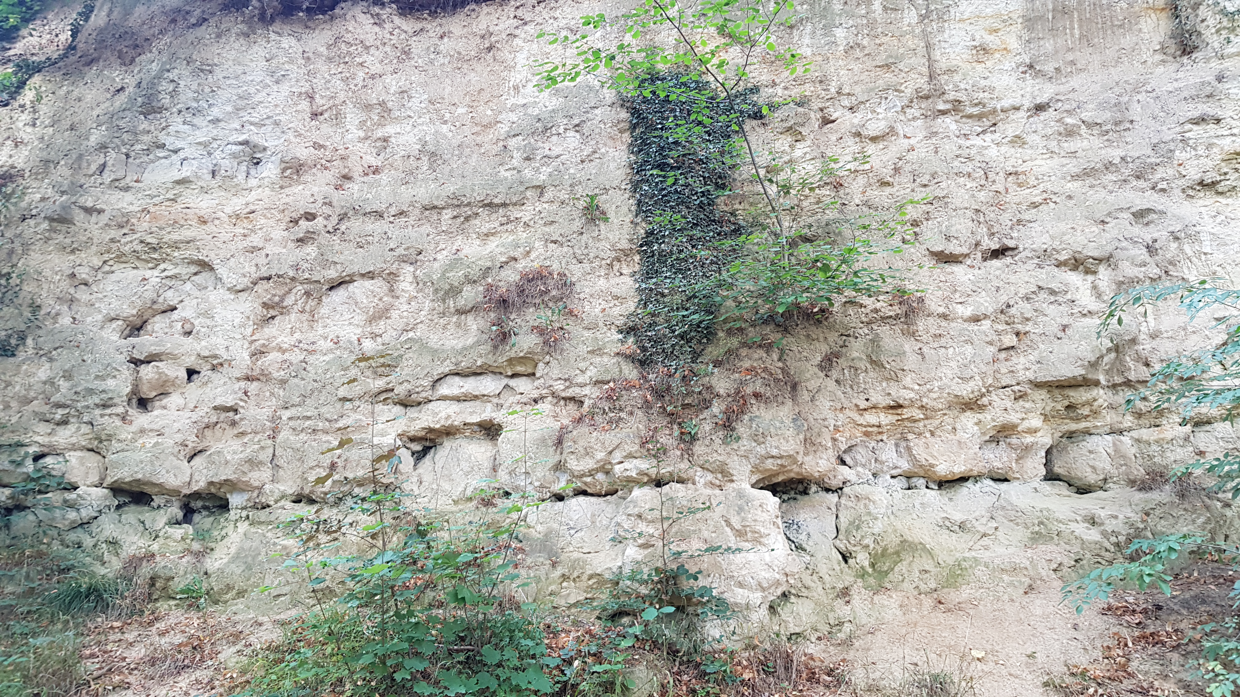 Groeve bij de Drie Beeldjes, Oud-Valkenburg, Valkenburg aan de Geul, Nederland